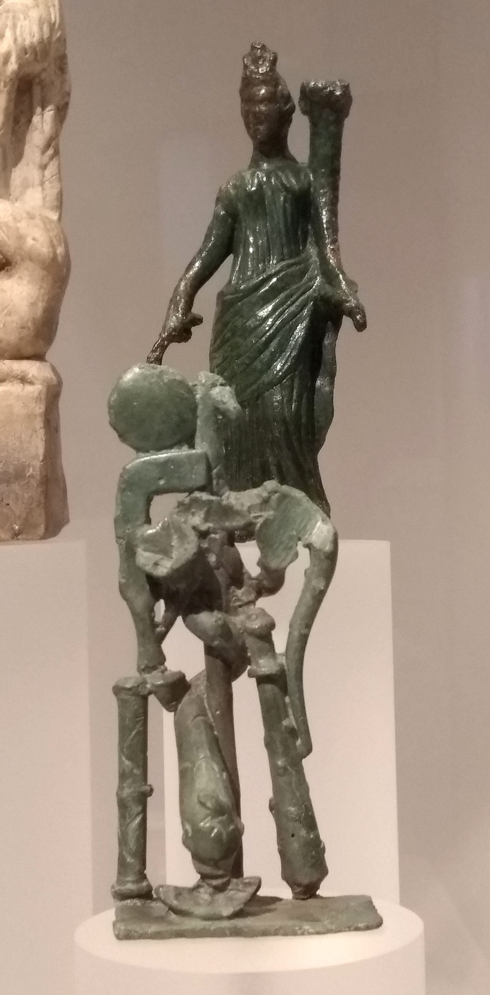 Antikes pantheistisches Symbol, das die Wirkungsbereiche diverser Götter "zu einer universalen Macht" (so die Beschreibungstafel) vereinen soll, indem es ihre jeweiligen Attribute darstellt: "Delphin und Muschel des Neptun, Spiegel der Venus, Keule des Herkules, Köcher der Diana, Rebmesser des Silvanus, Hirtenstab des Pan, zwei Füllhörner der Fortuna" (ebd.). Metallobjekt im Rheinischen Landesmuseum Bonn.